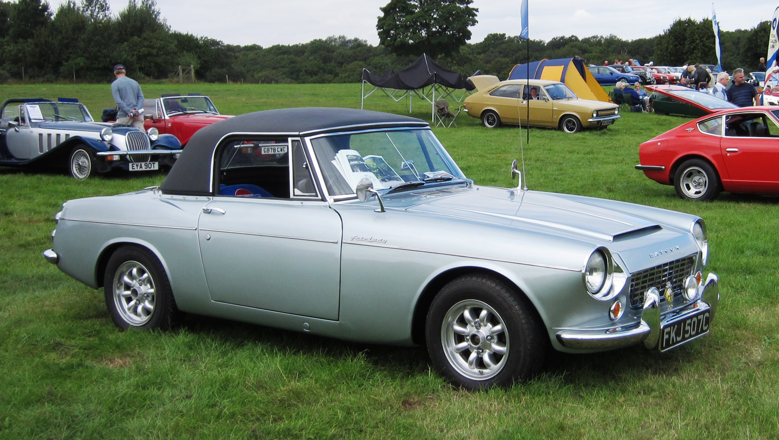 Datsun Fairlady 1500 de 1965